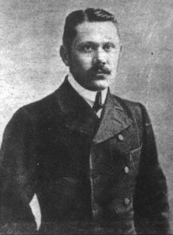 Hollán Sándor államtitkár. Meggyilkolták 1919. április 22-ről 23-ra virradóra. A nyomtatásban megjelent kép felirata ez volt: Április 23. Ifjú Hollán Sándor.